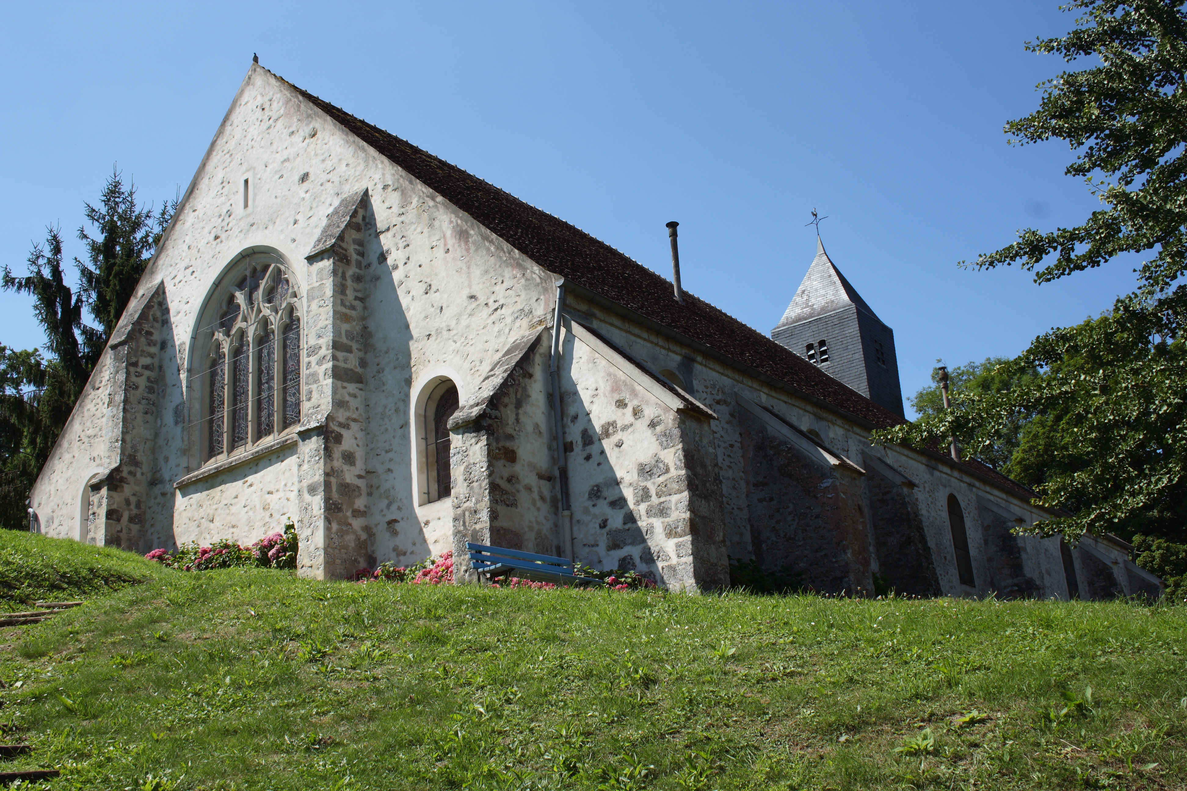 Katholische Kirche Saint-Sulpice in La Celle-sur-Morin im Département Seine-et-Marne in der Region Île-de-France (Frankreich), Ansicht von Südosten